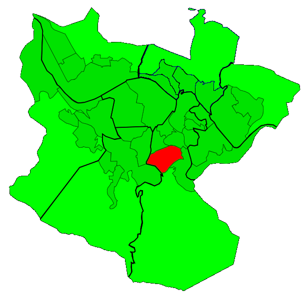 San Adrian-Miribillako auzoaren mapa.